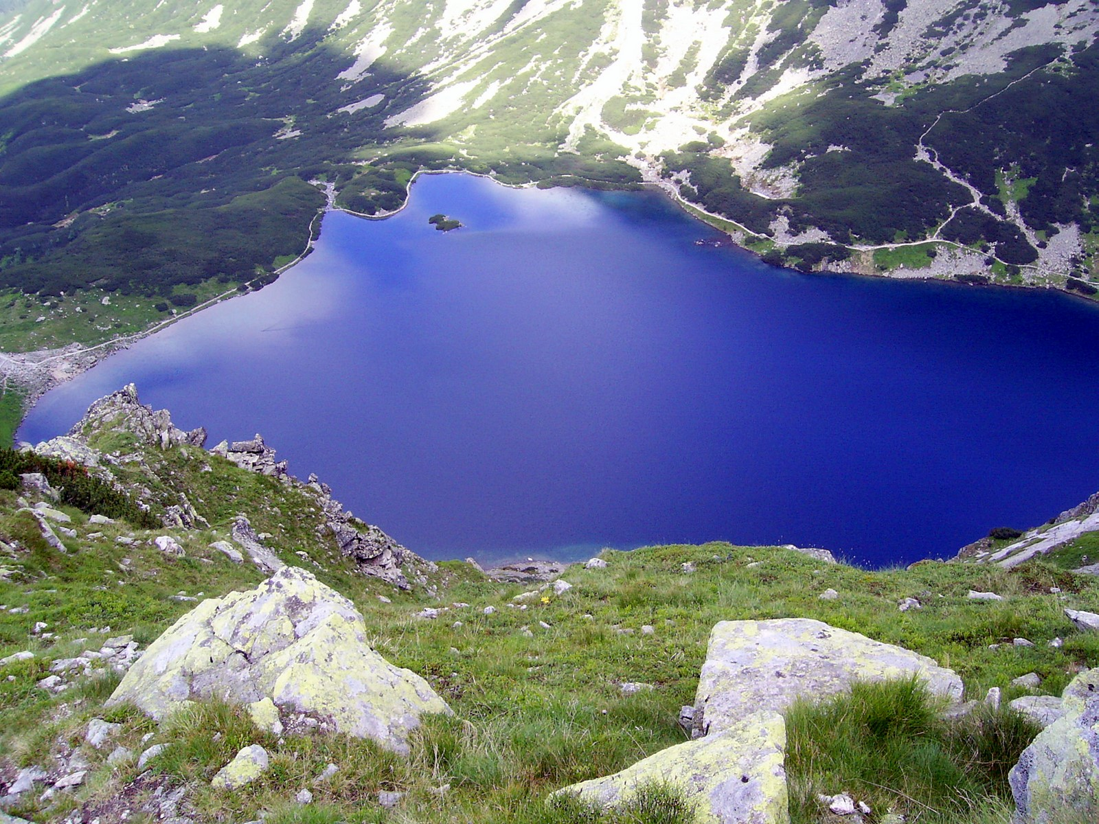 Czarny Staw Gąsienicowy ze zboczy Kościelca